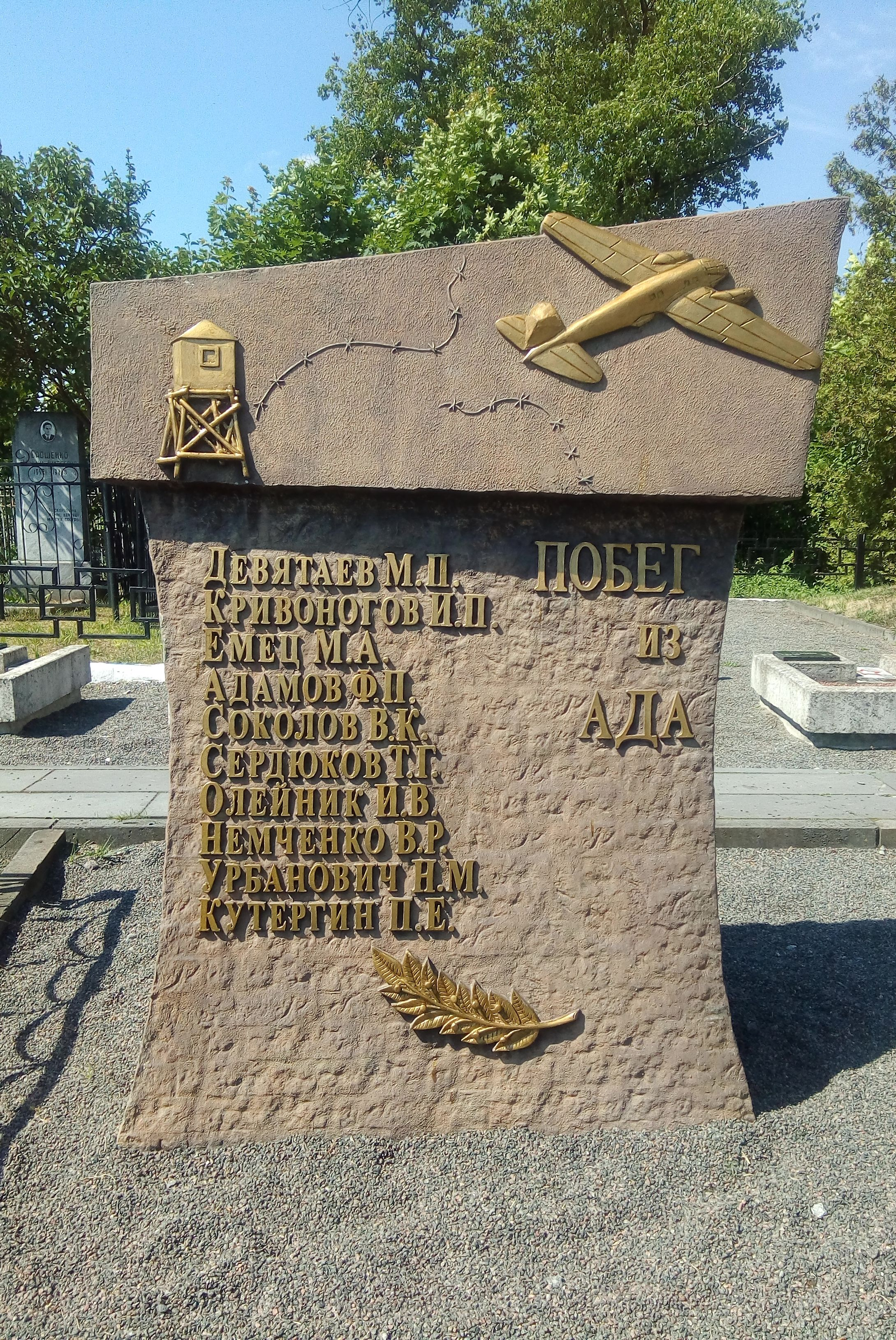 Монумент в память о побеге советских военнопленных из немецкого концлагеря на острове Узедом. Находится на Новобелицком кладбище г. Гомеля